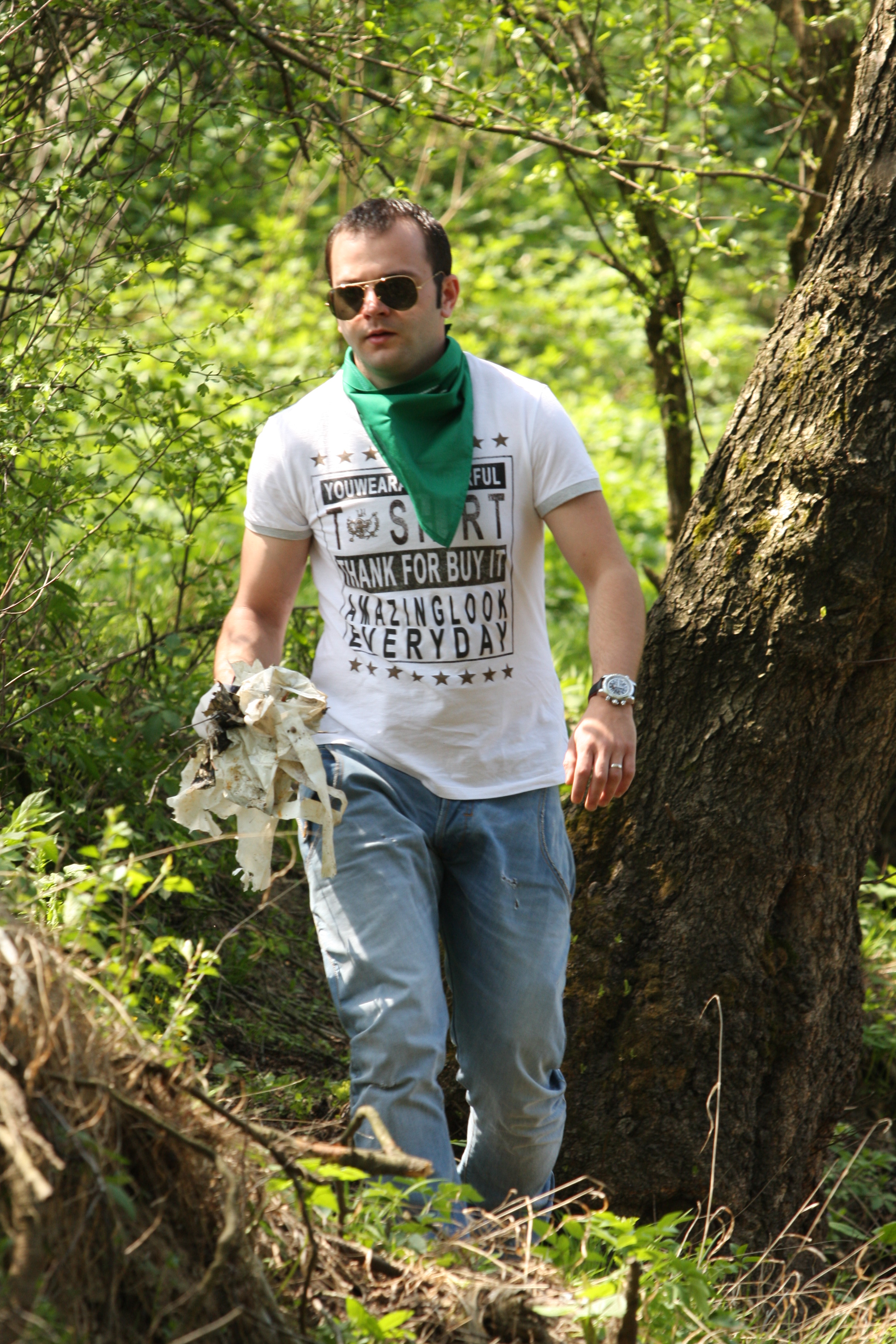 Mihai Morar la acțiunea de ecologizare a pădurii Făget